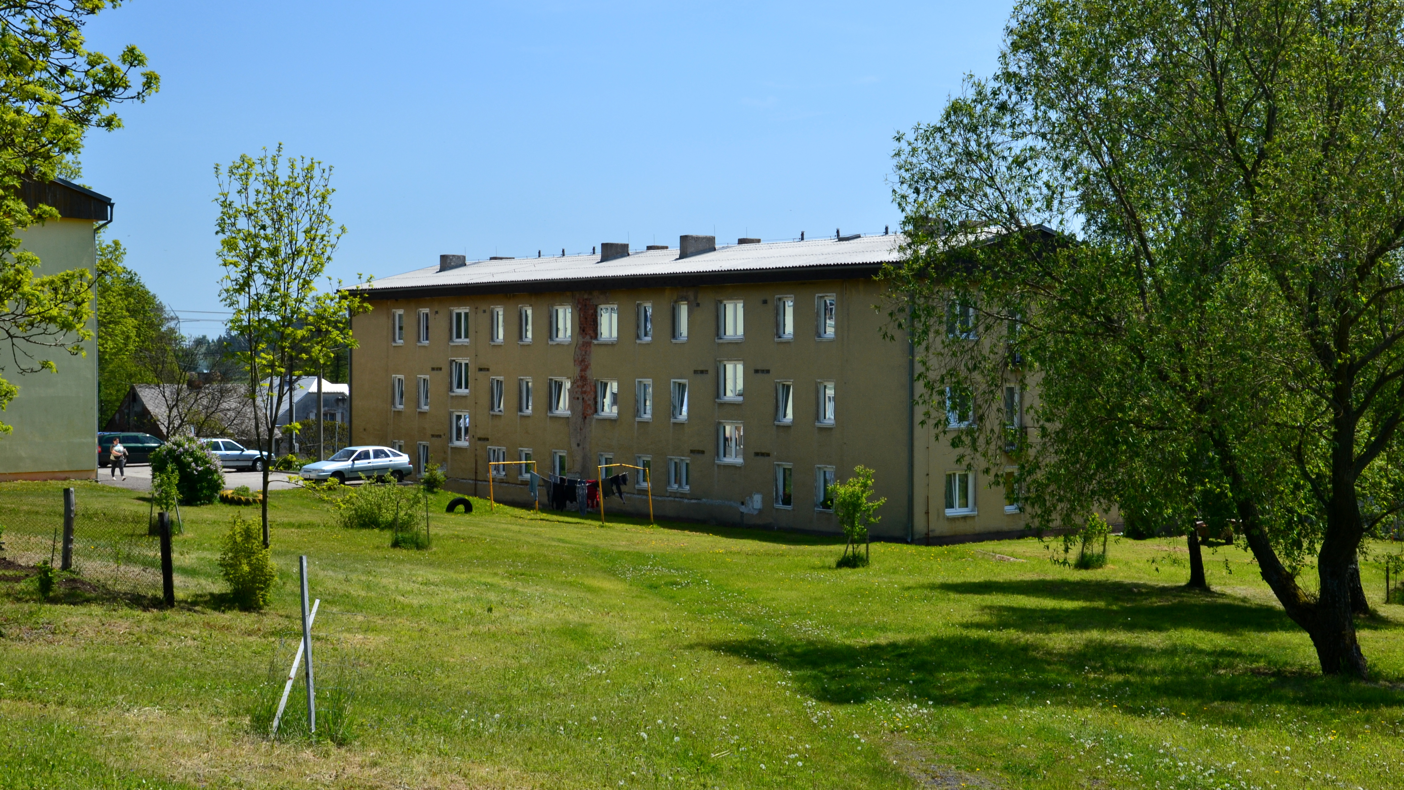 Jeden z bytových domů